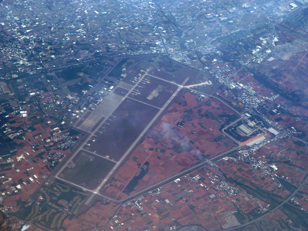 台中空港滑走路、上空から撮影。